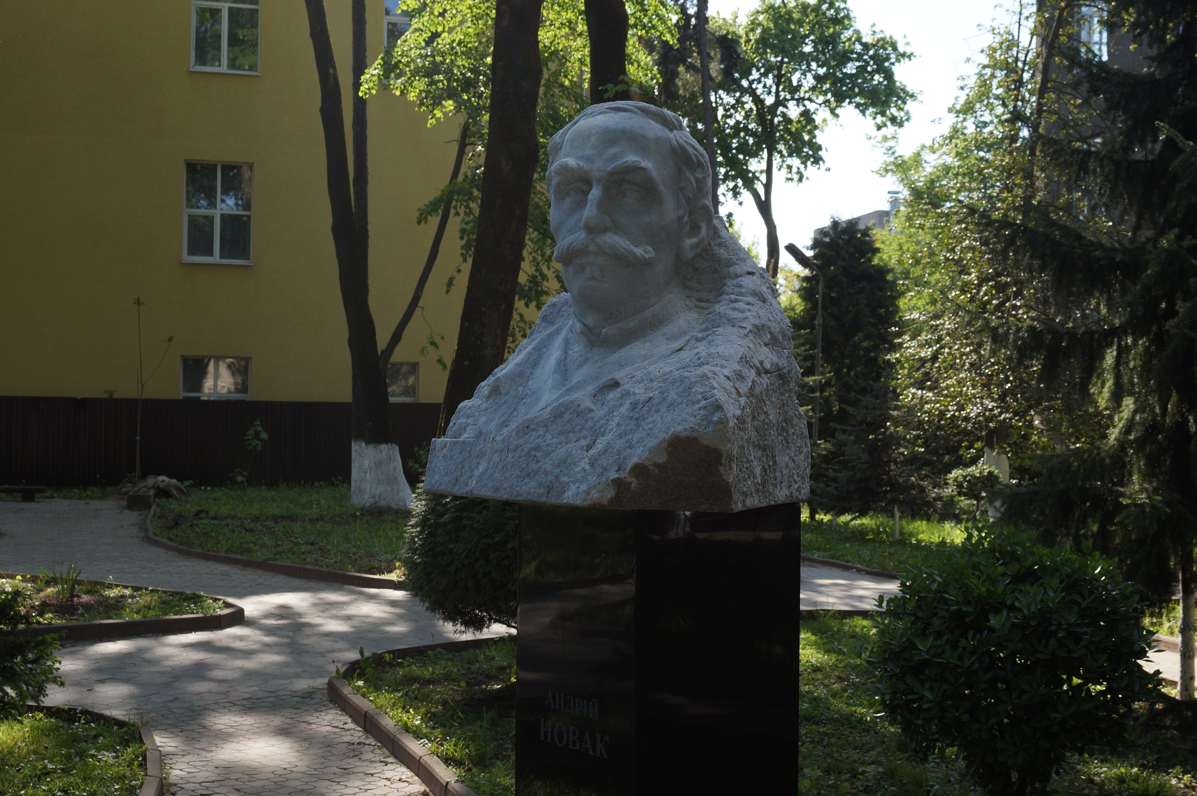 Погруддя Ендре Новаку, засновнику Ужгородської лікарні, Ужгород, вул. Капушанська, 22, подвір'я обласної лікарні